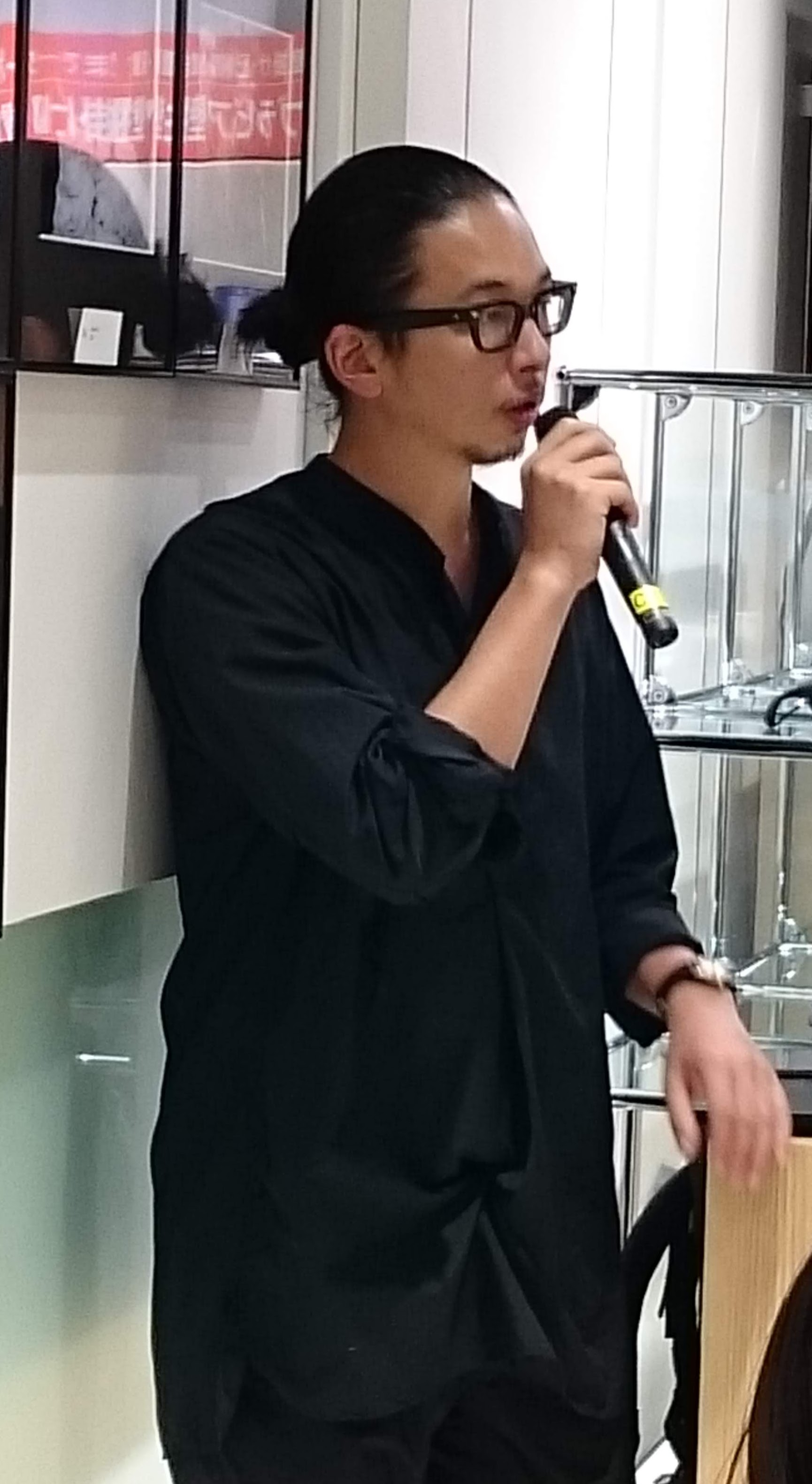 写真家、プロカメラマンの佐藤健寿（於：ソニーストア大阪）